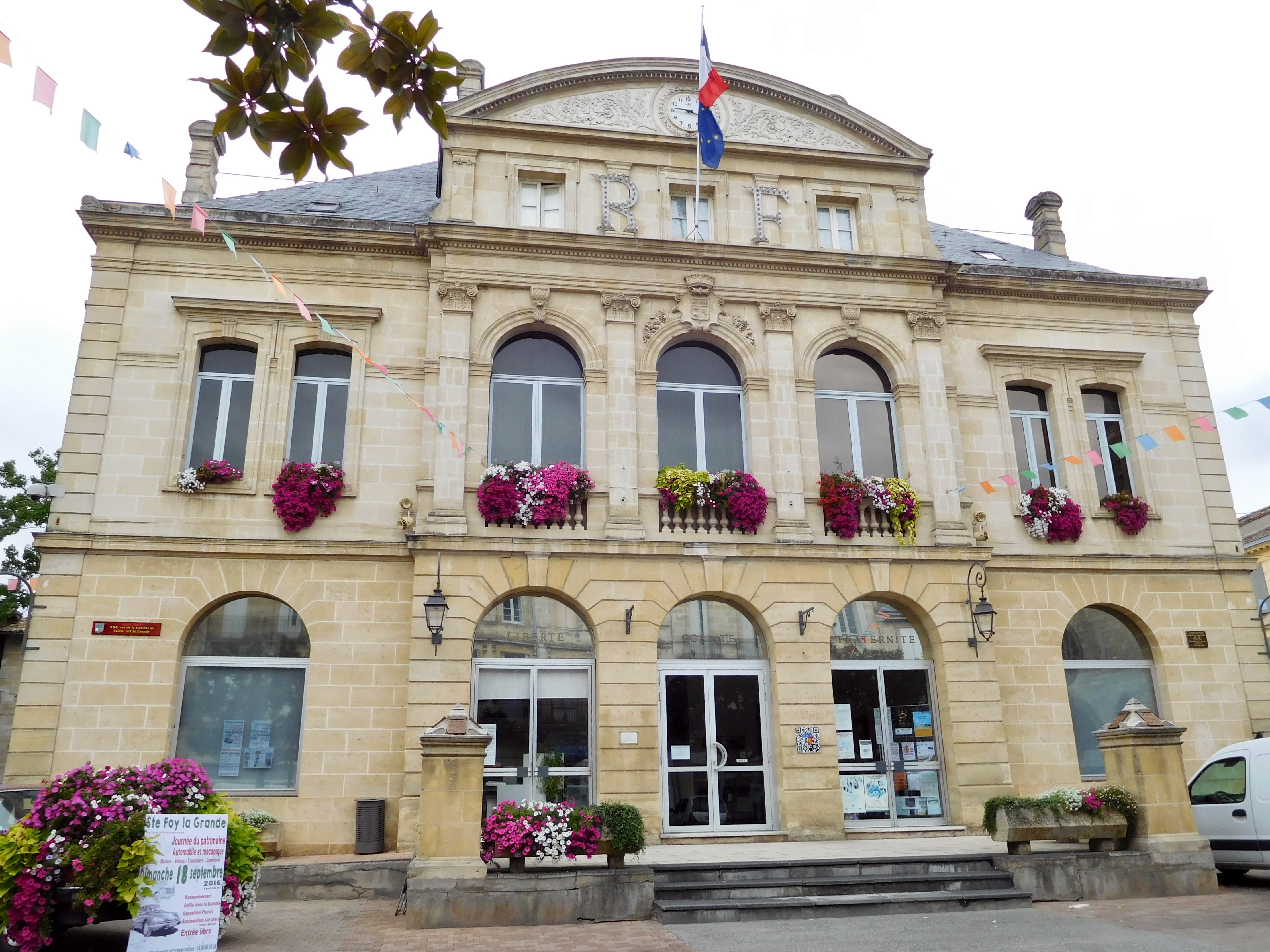 Façade de la mairie de Sainte-Foy-la-Grande.